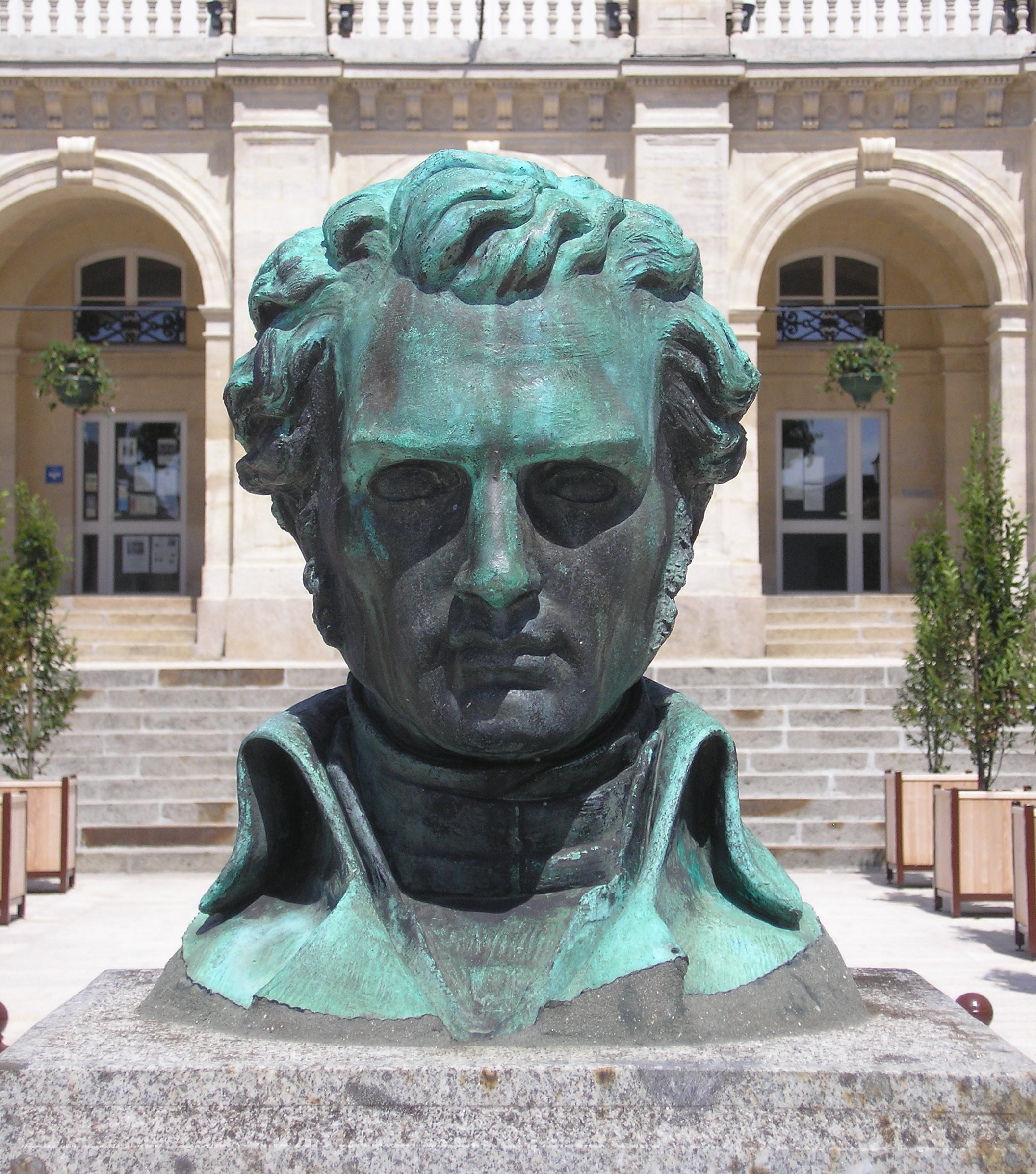 Sées (Normandie, France). Le buste de Nicolas-Jacques Conté par Jules Antoine Droz (1804-1872).